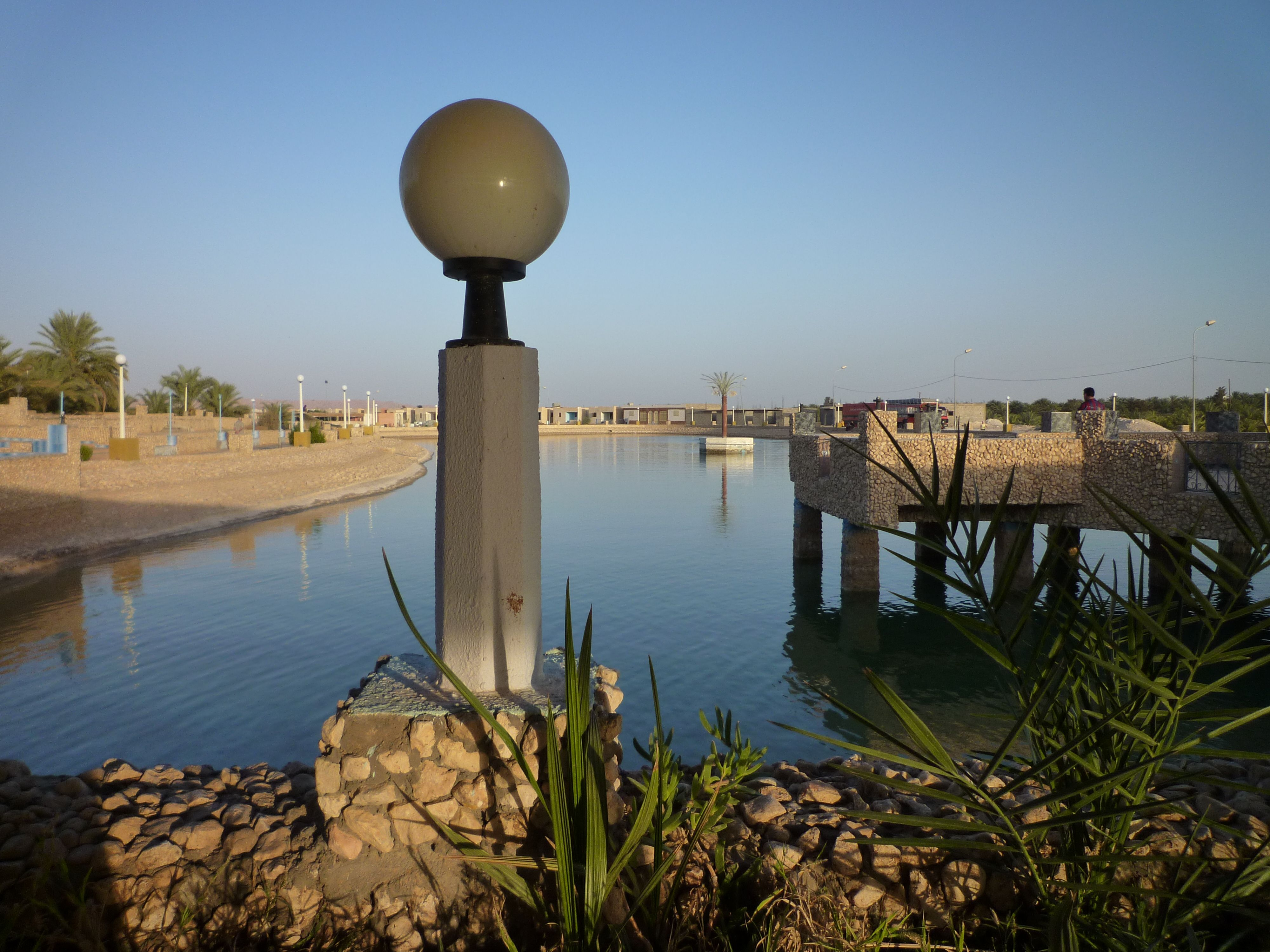 Waddan - Thermalbad-Anlage_03